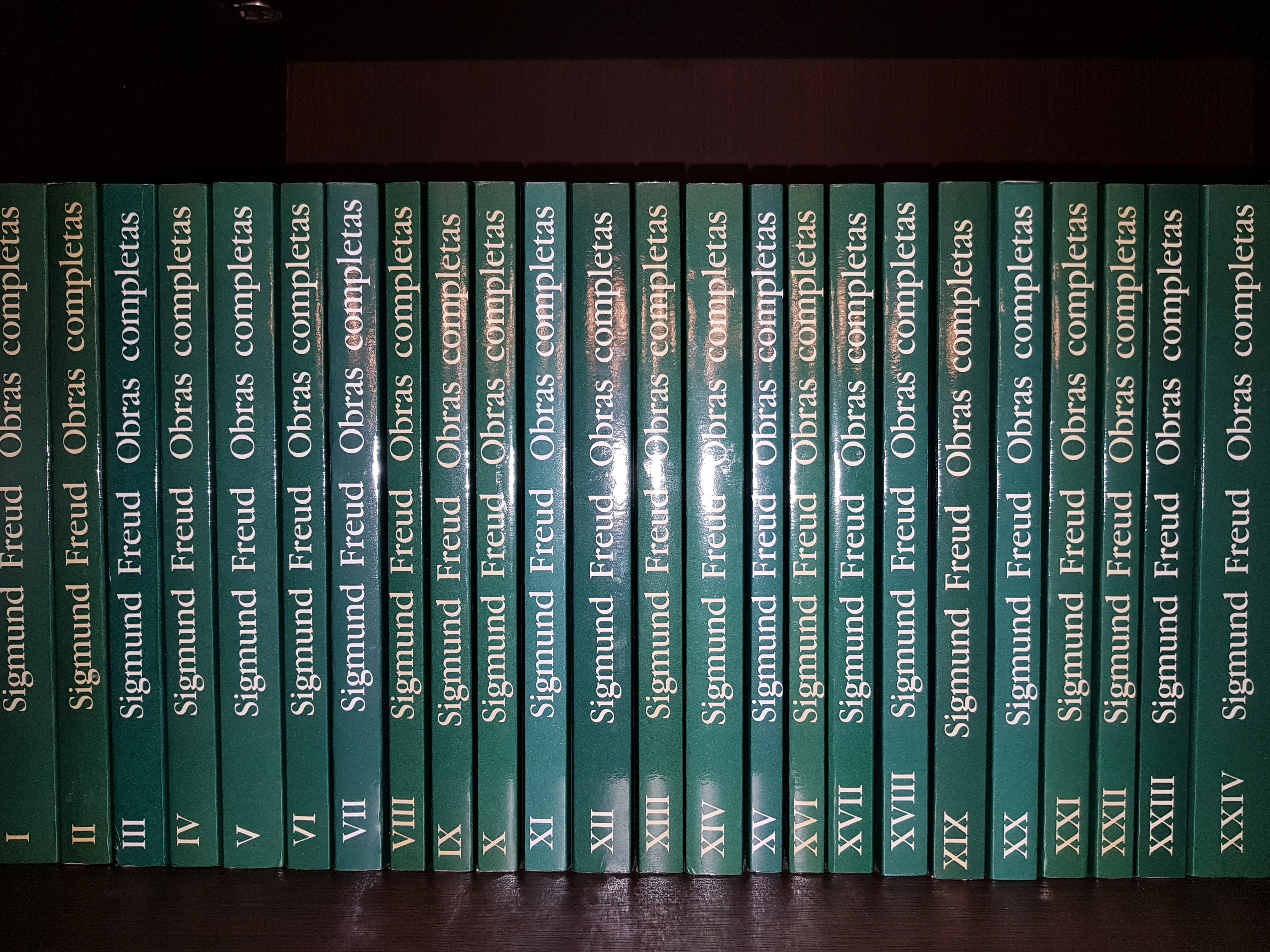 Obras completas de Sigmund Freud en español.